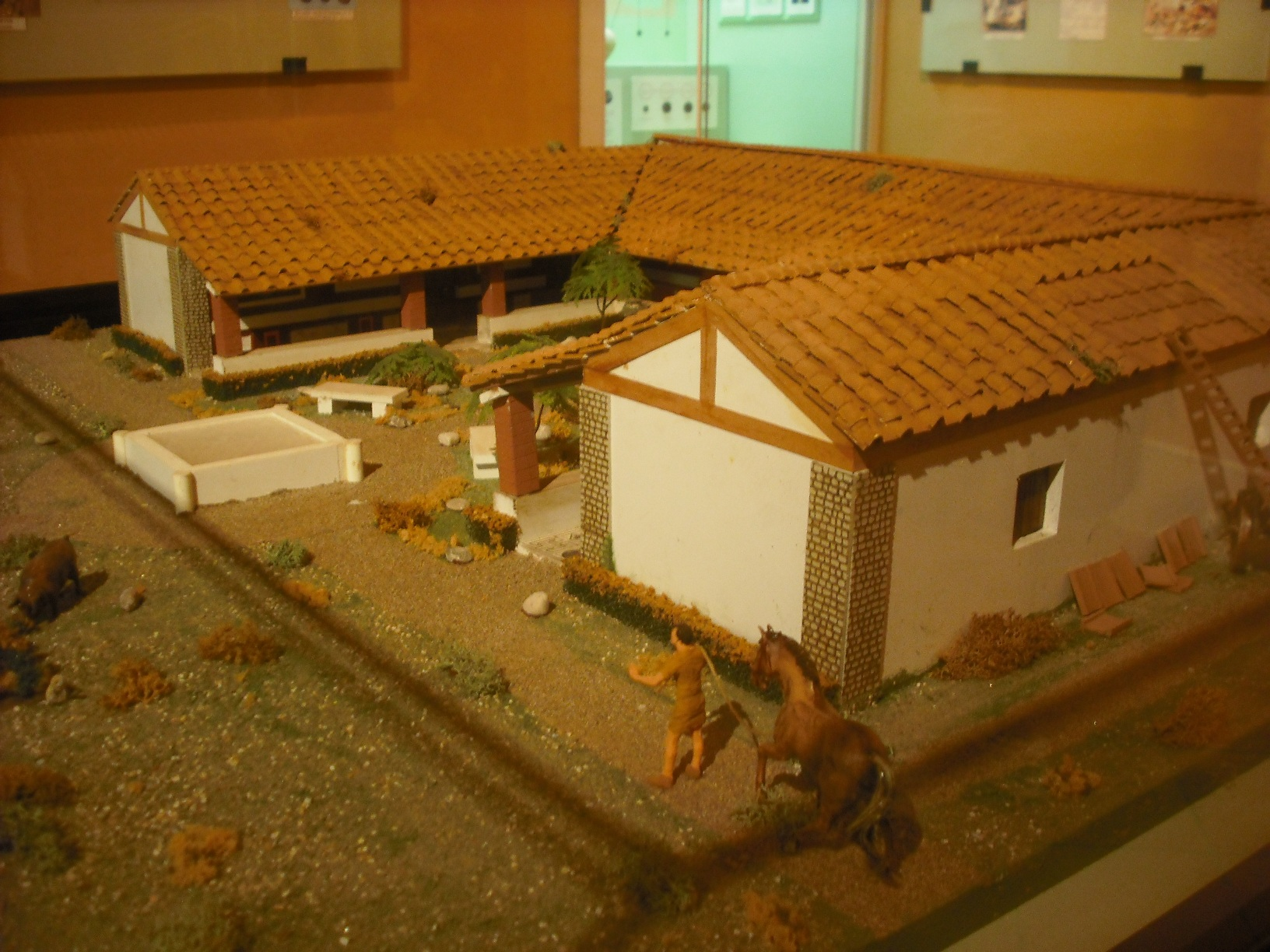 Maqueta de la villa romana del Palmeral al Museu del Mar.